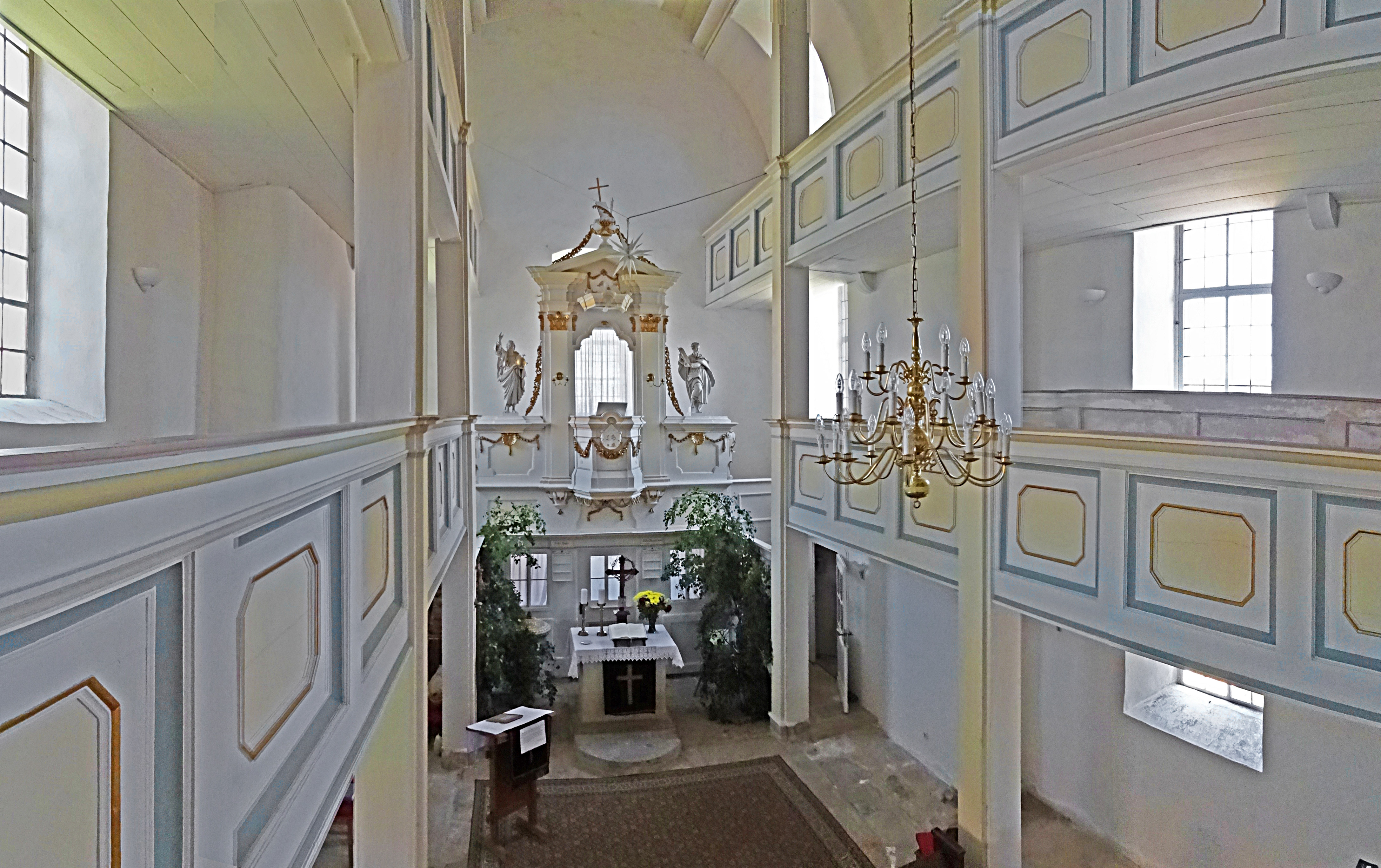 Blick durchs Kirchenschiff in der Dorfkirche Heyda